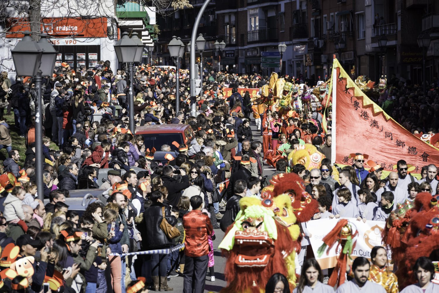 Más de 400.000 personas celebran el Año Nuevo Chino en Usera con récord de público. El barrio de Usera vuelve a convertirse en el centro de la programación municipal del Año Nuevo Chino, que aumenta un 15% su público